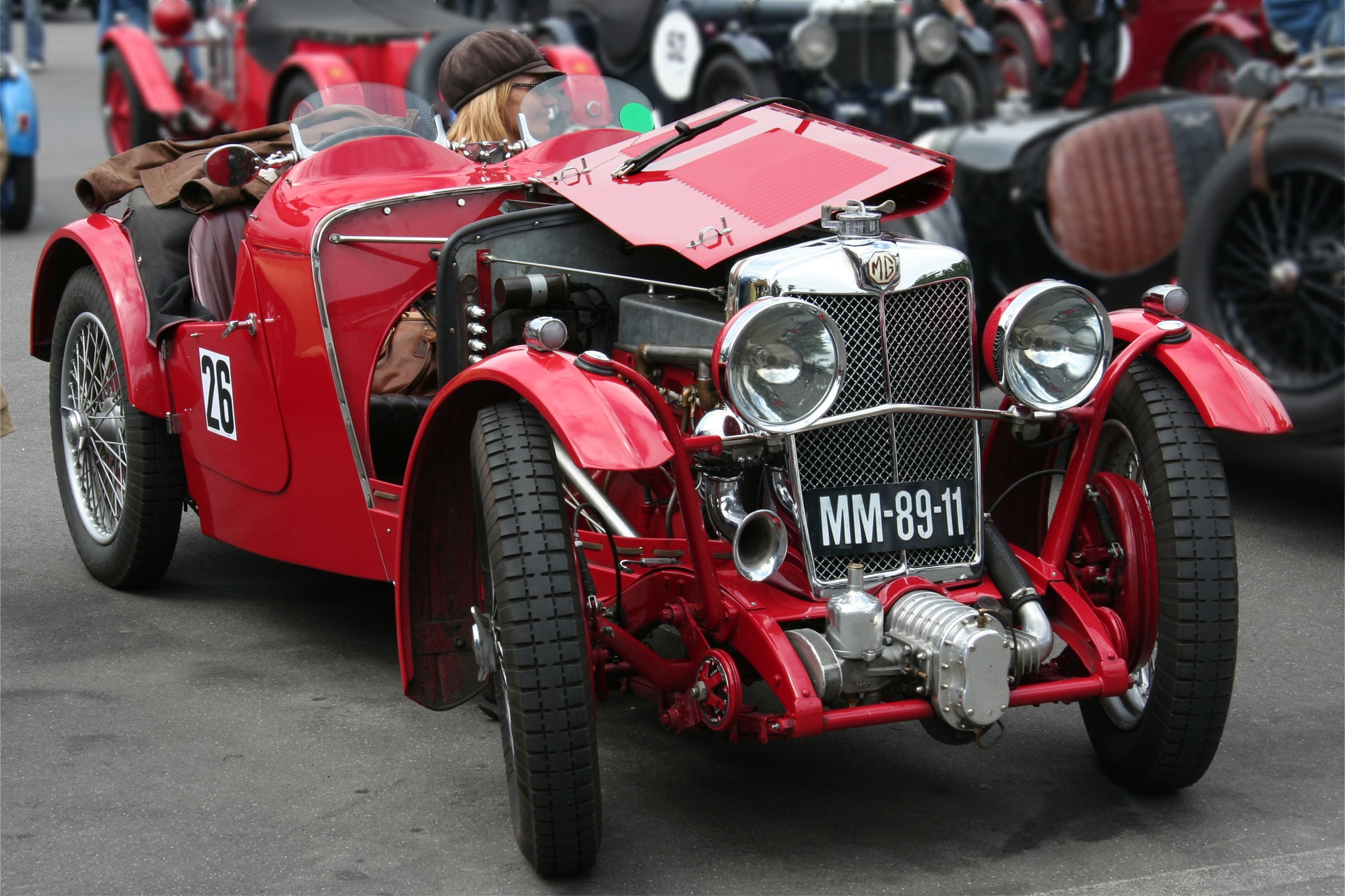 MG F2, Baujahr 1932 (Kennzeichen verändert)